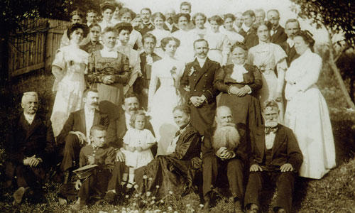 Вяселле Францішка Умястоўскага. Першы справа — Францішак Аляхновіч